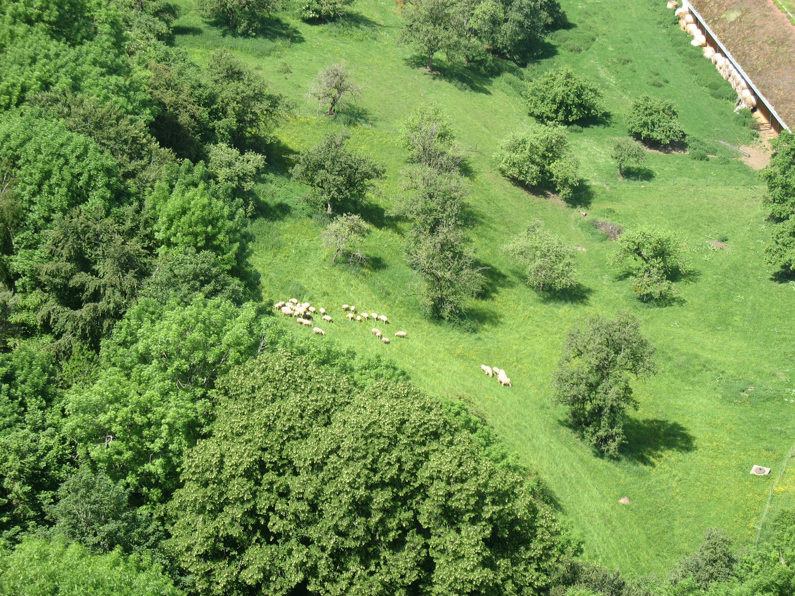 Weidende Schafe am Hohentwiel